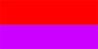 Summary Drapeau de la principauté de Jaisalmer Source Nataraja Statut Nataraja Catégorie:Drapeau de principauté des Indes